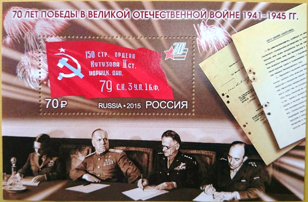 Фото почтовой марки России, 2015 год. Знамя Победы